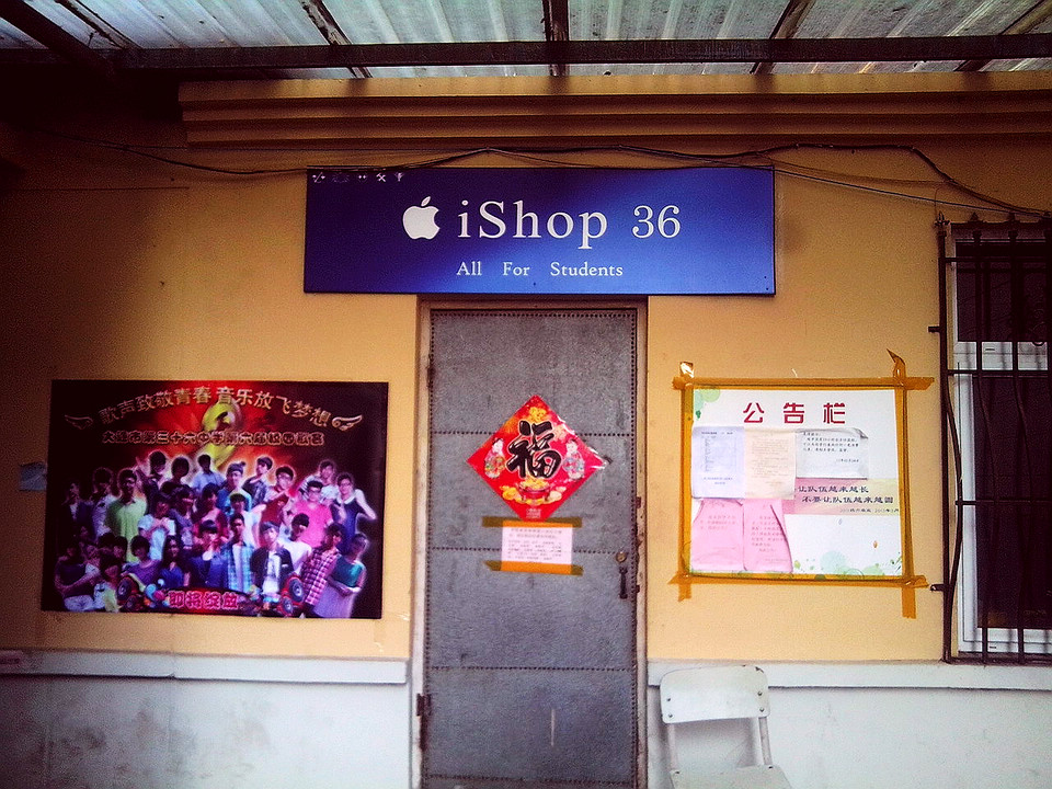 大连市第三十六中学小卖部自改为学生经营后挂上了iShop的牌子